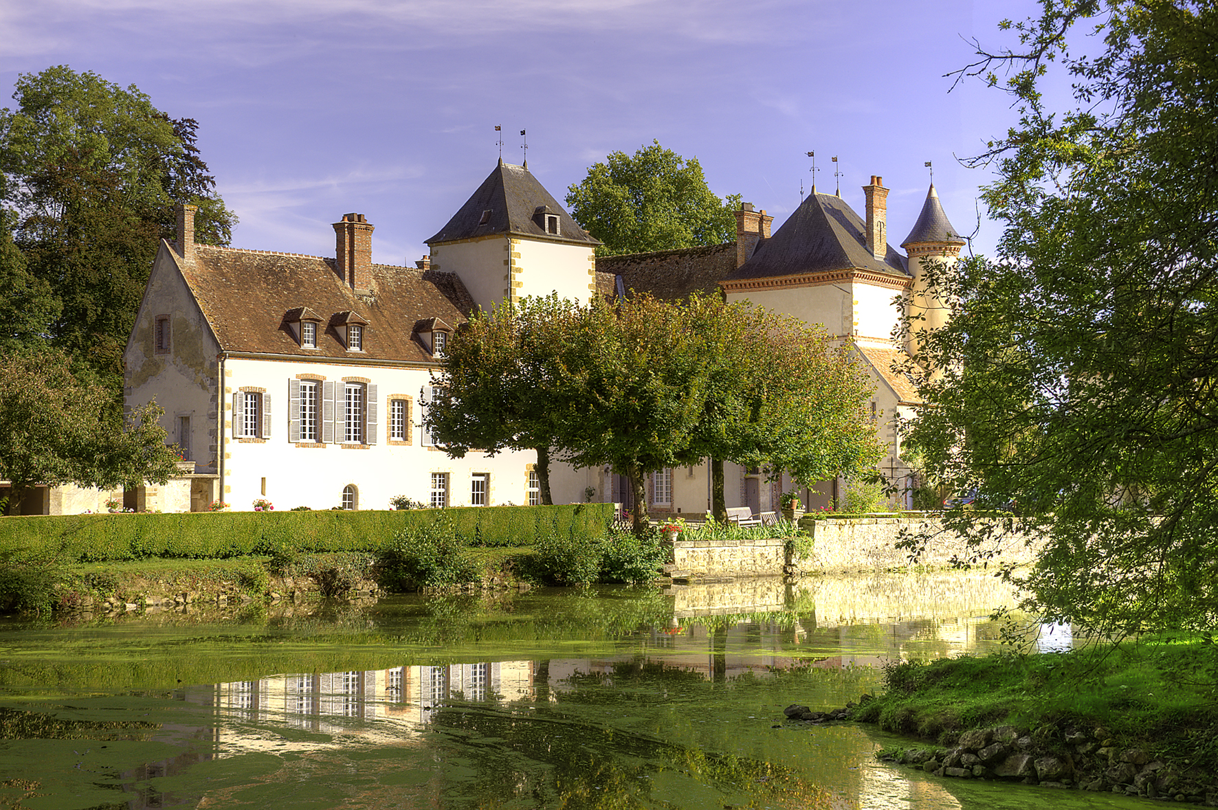 Une autre vue de ce charmant petit château.